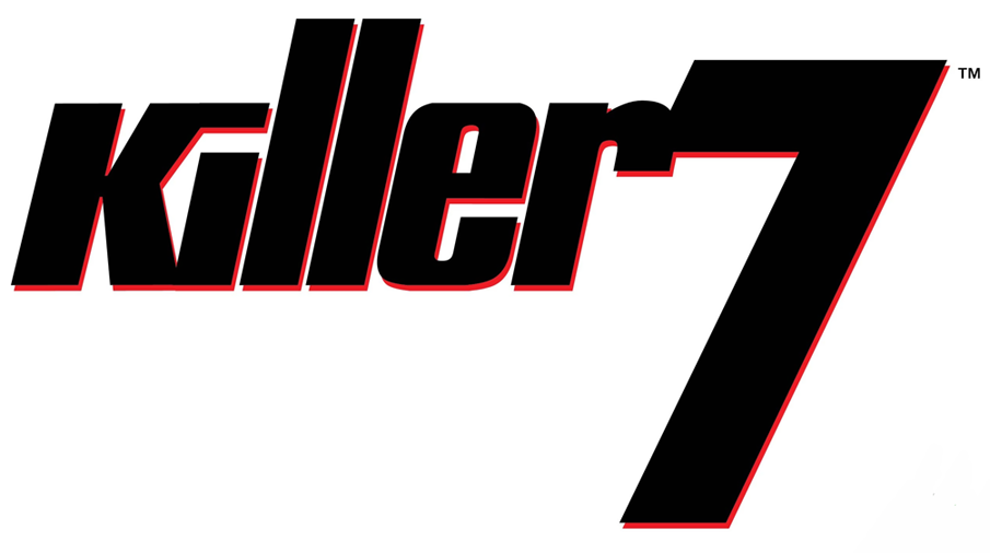 Killer 7 Logo